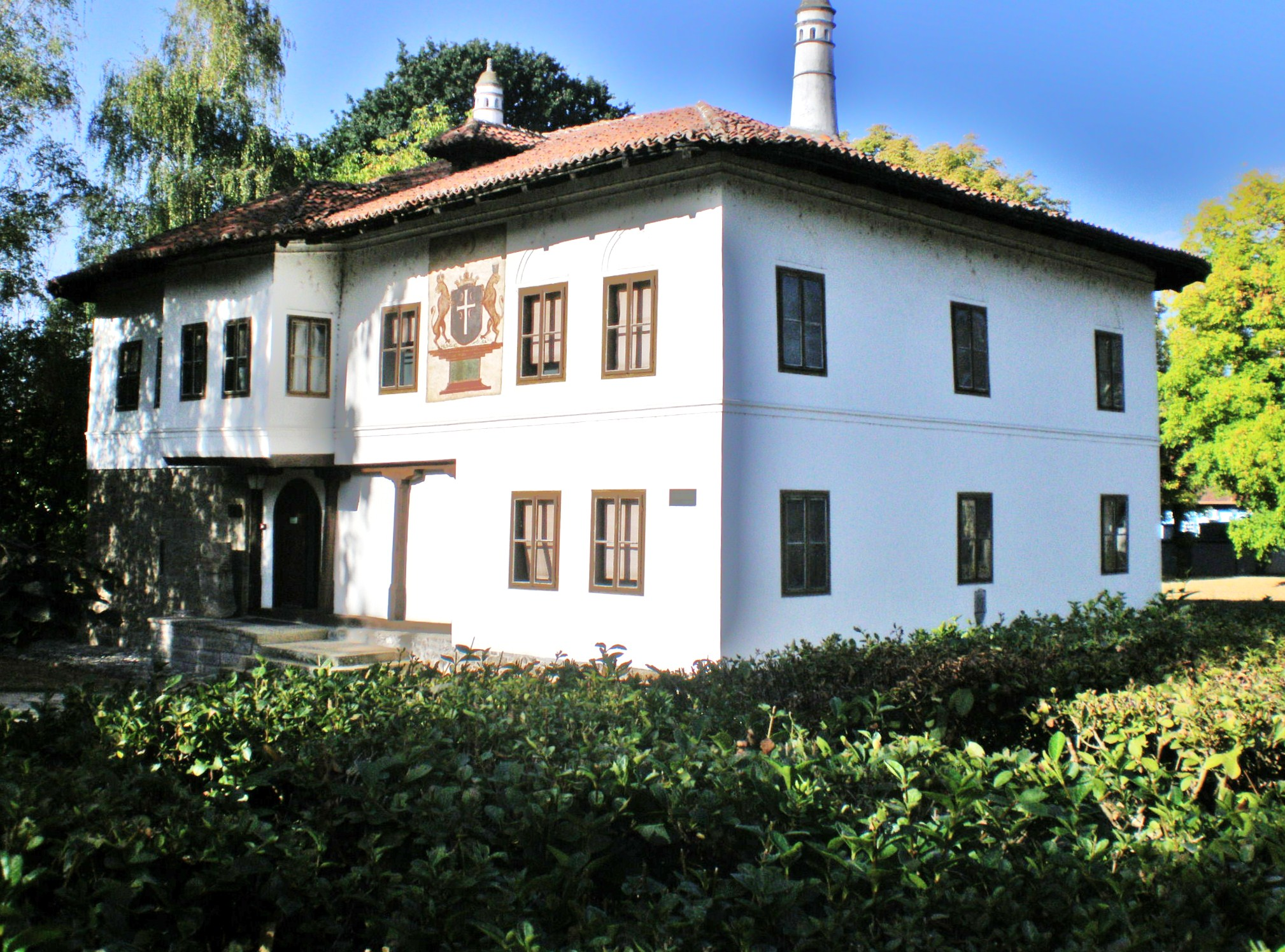 У Господар Јовановом конаку данас се налази Народни музеј.